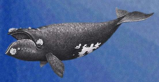 Ballena franca del Pacífico norte (Eubalaena japonica); crop of original